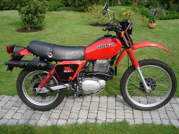 Honda XL 500 SB Motorrad Enduro